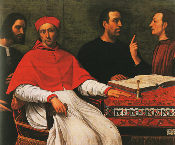 Cardenal Pedro Luis de Borja Llançol de Romaní (1472-1511)